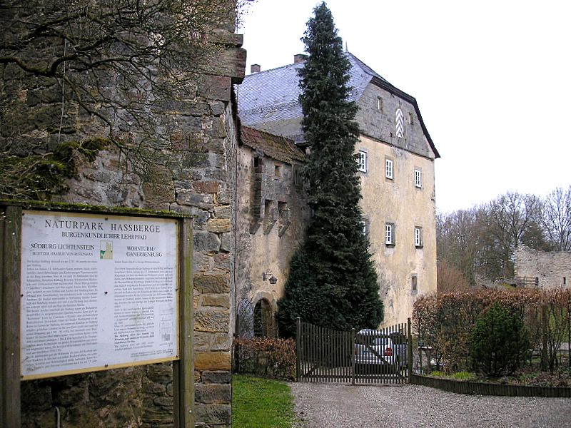 Burg Lichtenstein, Südburg (Gemeinde Pfarrweisach, Landkreis Haßberge, Unterfranken). Ansicht von Nordosten. Eigene Aufnahme, Jan. 2007 / Lichtenstein castle (Southern castle) near Pfarrweisach (Lower Franconia, Germany). View from north-east. Own photo, Jan. 2007